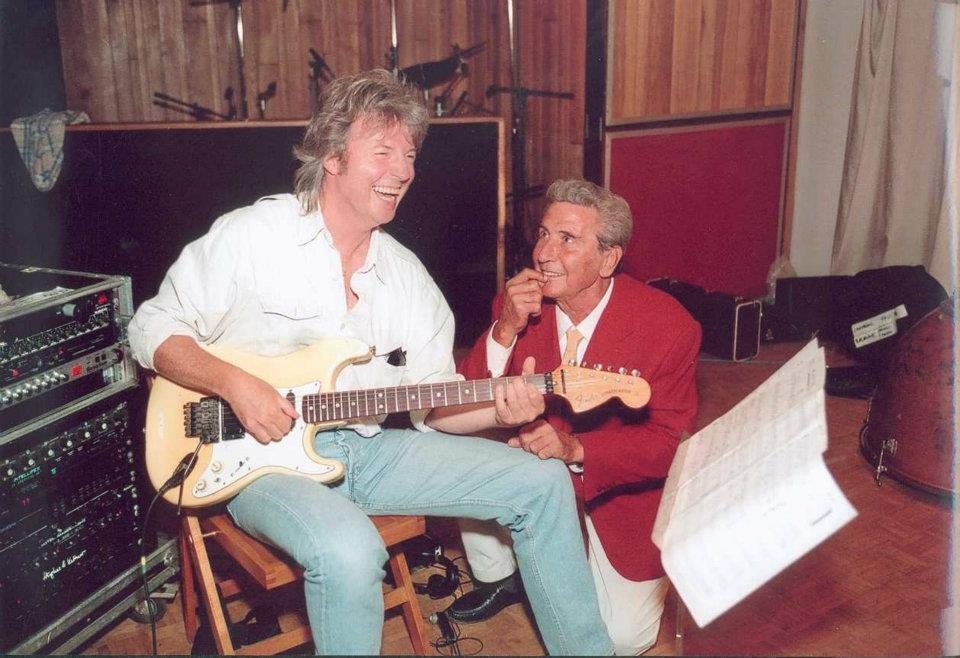 Sceance de Studio Gilbert Bécaud 1997